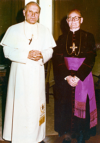 Reproducción fotográfica de Jorge Kemerer y Juan Pablo II